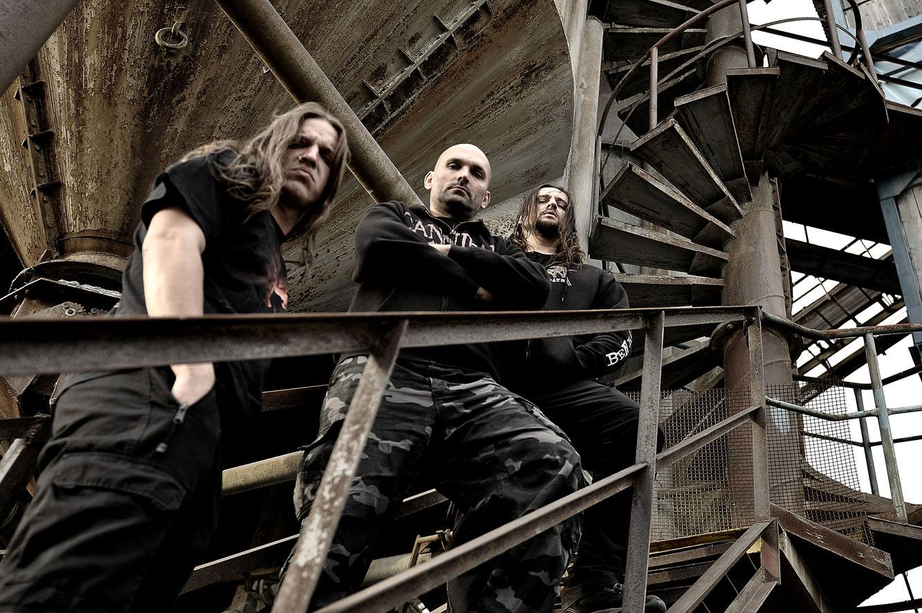 The czech death-metal band Tortharry.